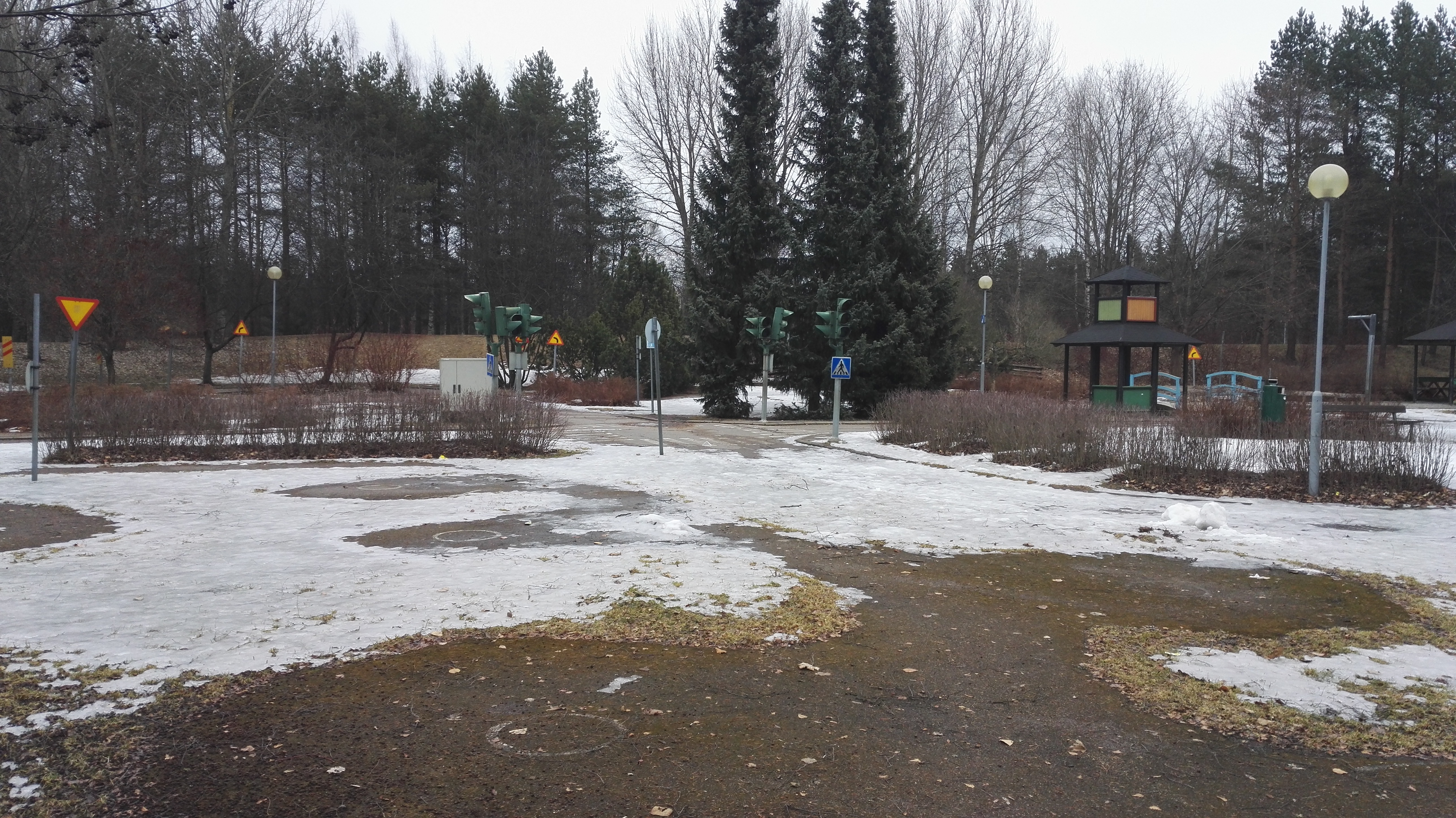 Lasten liikennepuisto